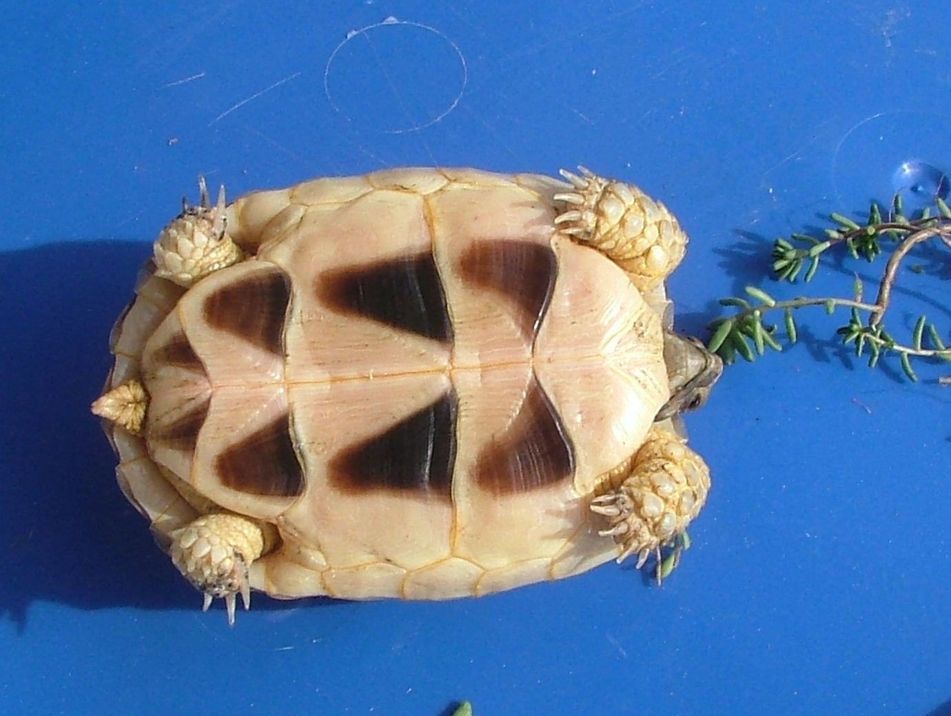 Testudo marginata,Foto von Richard Mayer,GNU-FDL